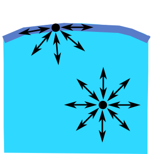 Bildbeschreibung: Wasser in Tropfen und an der Phasengrenze Fotograf/Zeichner: Roland.chem Datum: 17.4.06 Sonstiges: ...